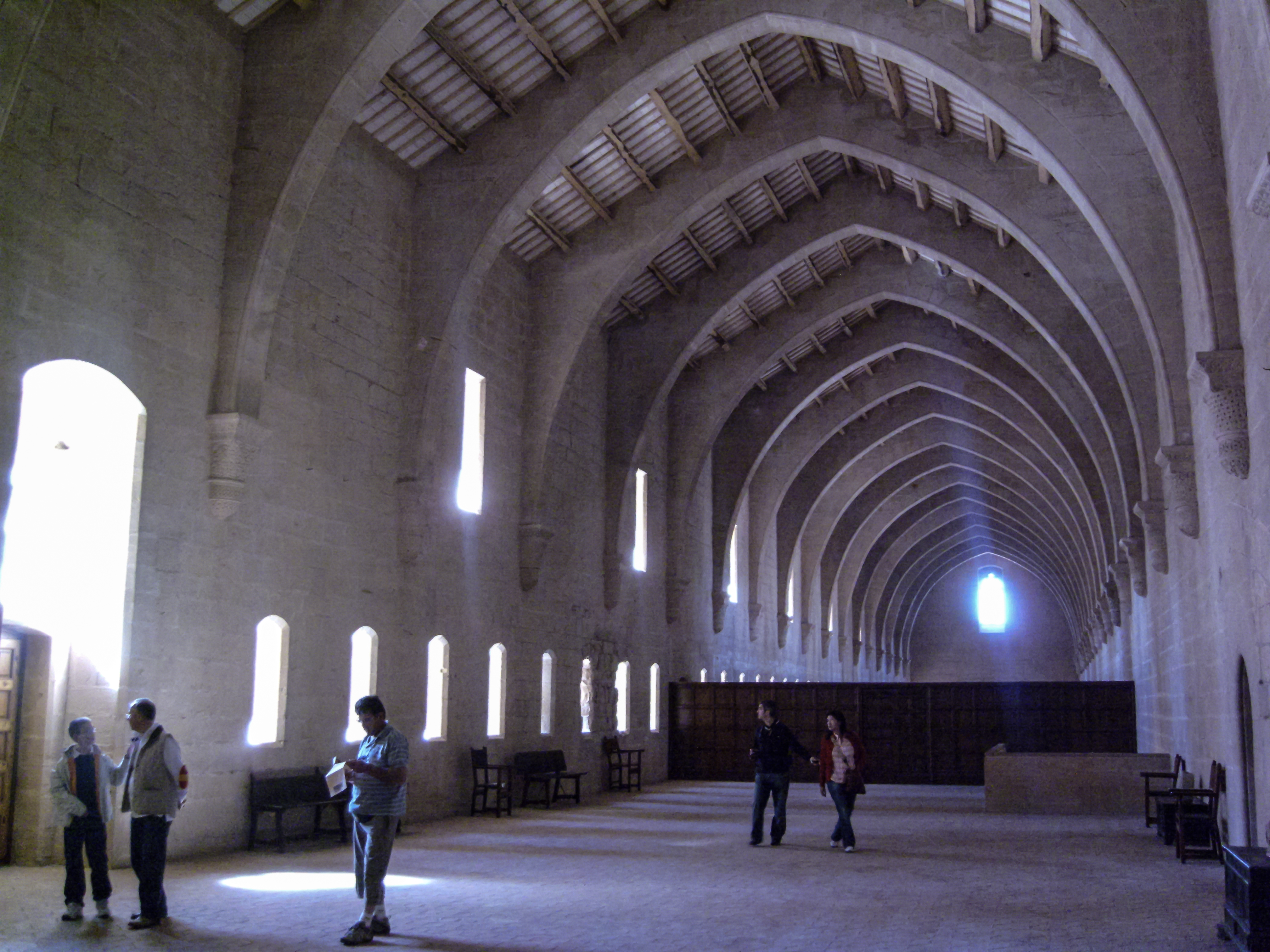 CS 02052009 #164942 #40527.jpg